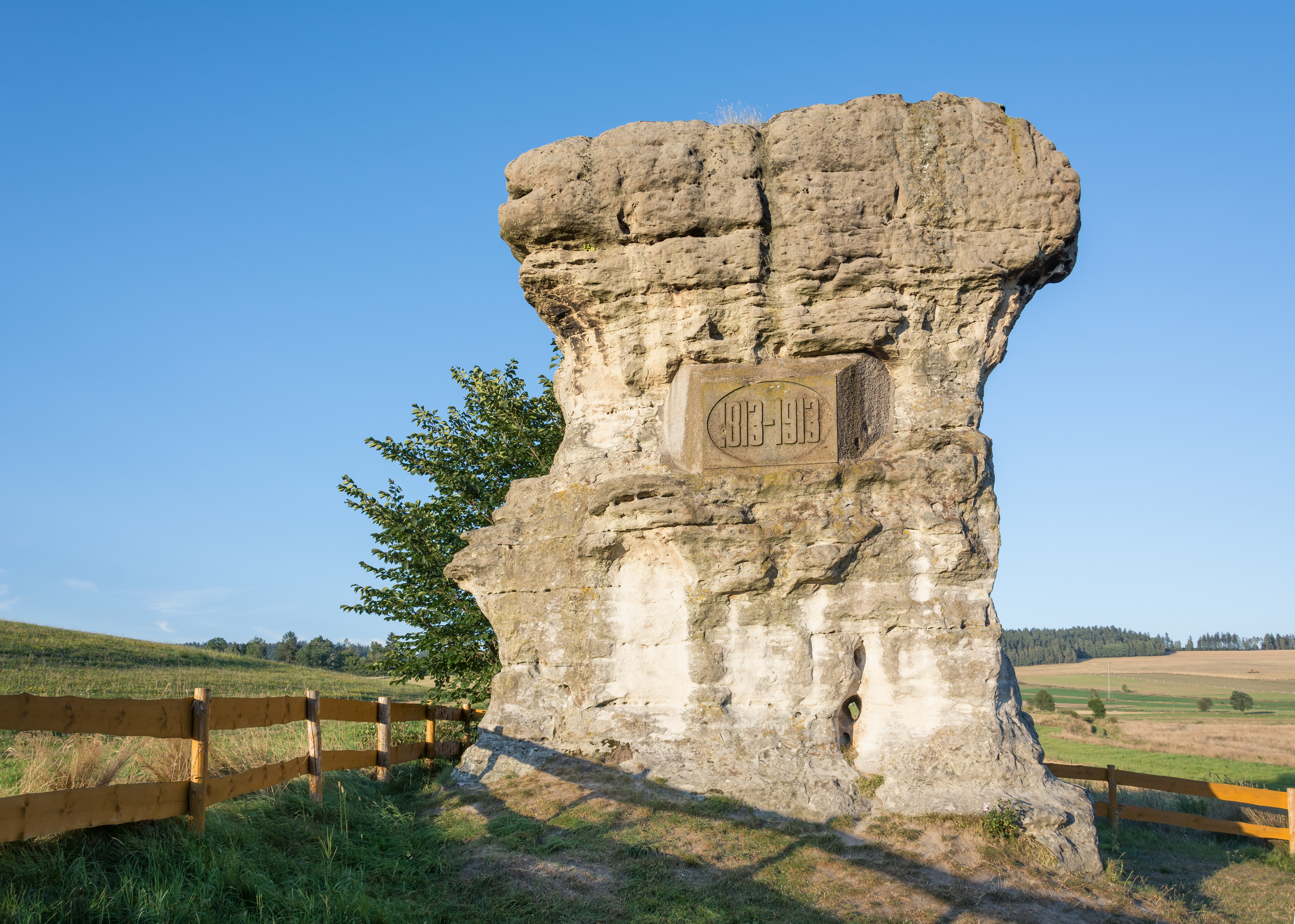 Pomnik przyrody: Diabelska Maczuga This is a photography of protected area with CRFOP ID PL.ZIPOP.1393.PP.0207022.515